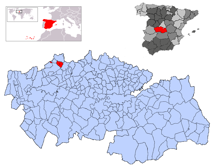 Almendral de la Cañada en la provincia de Toledo